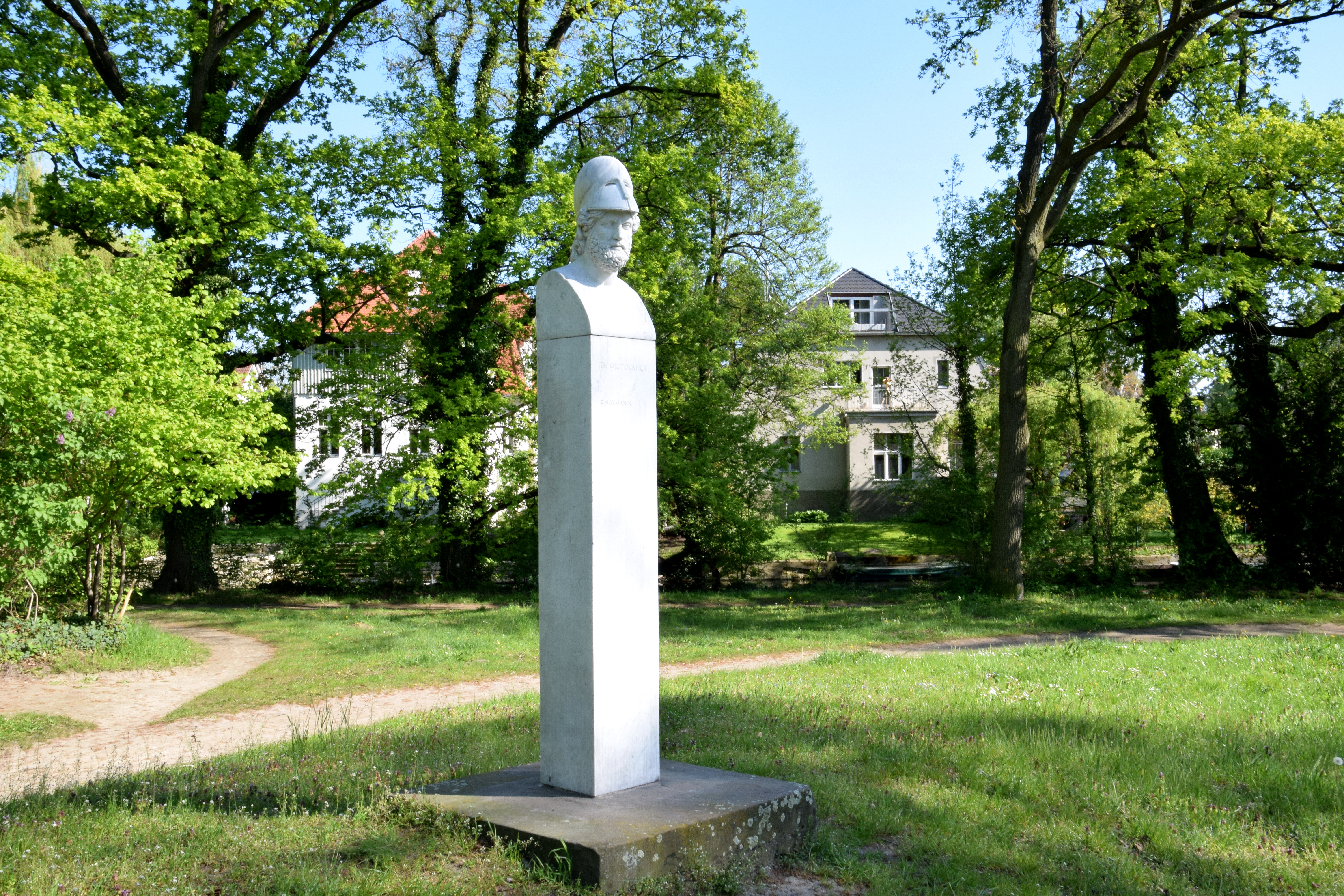 Die Themistokles-Herme am Ostufer des Heiligen Sees, gegenüber dem "Roten Haus", wurde nach einem antiken Original aus weißem Marmor gefertigt.